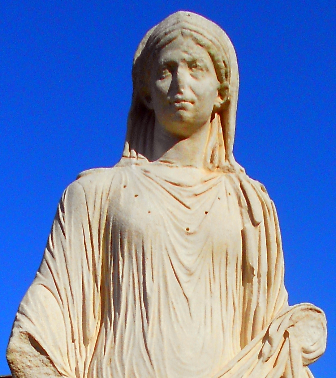 Detailansicht Vestalin aus dem Haus der Vestalinnen innerhalb des Forum Romanum.